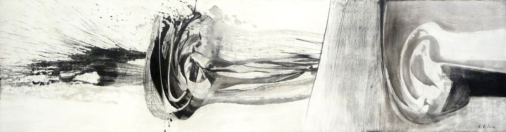 K. O. Götz, Bagatelle II, 1962, Mischtechnik auf Leinen, 100 x 380 cm